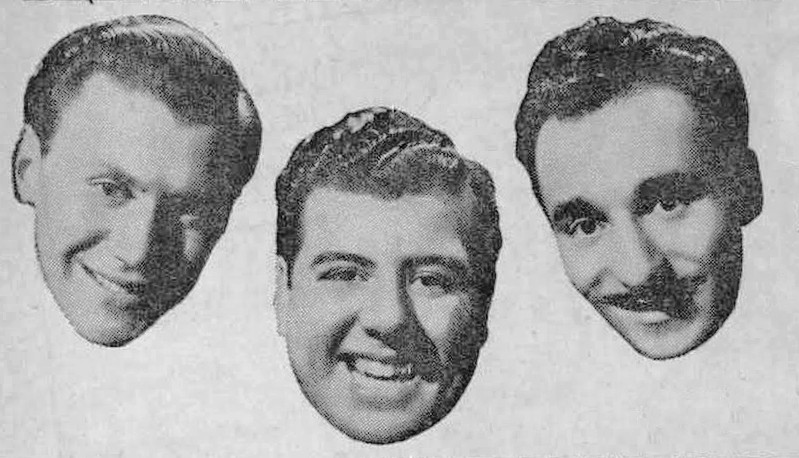 Harmonicats